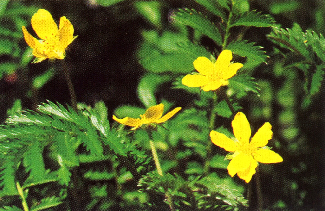 Potentilla anserina L. - silverweed cinquefoil